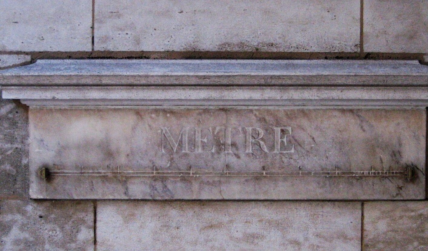 E Meter ("mètre étalon") dee 1795-1796 mat 15 aneren uechter Paräis op ëffentleche Plazen installéiert gouf. Dat hei ass ee vun zwee, déi et haut nach zu Paräis ginn, an deen eenzegen, deen op senger Originalplaz ass. En ass an der Rue Vaugirard op Nummer 36, nieft der Post, vis-à-vis vum Palais du Luxembourg.